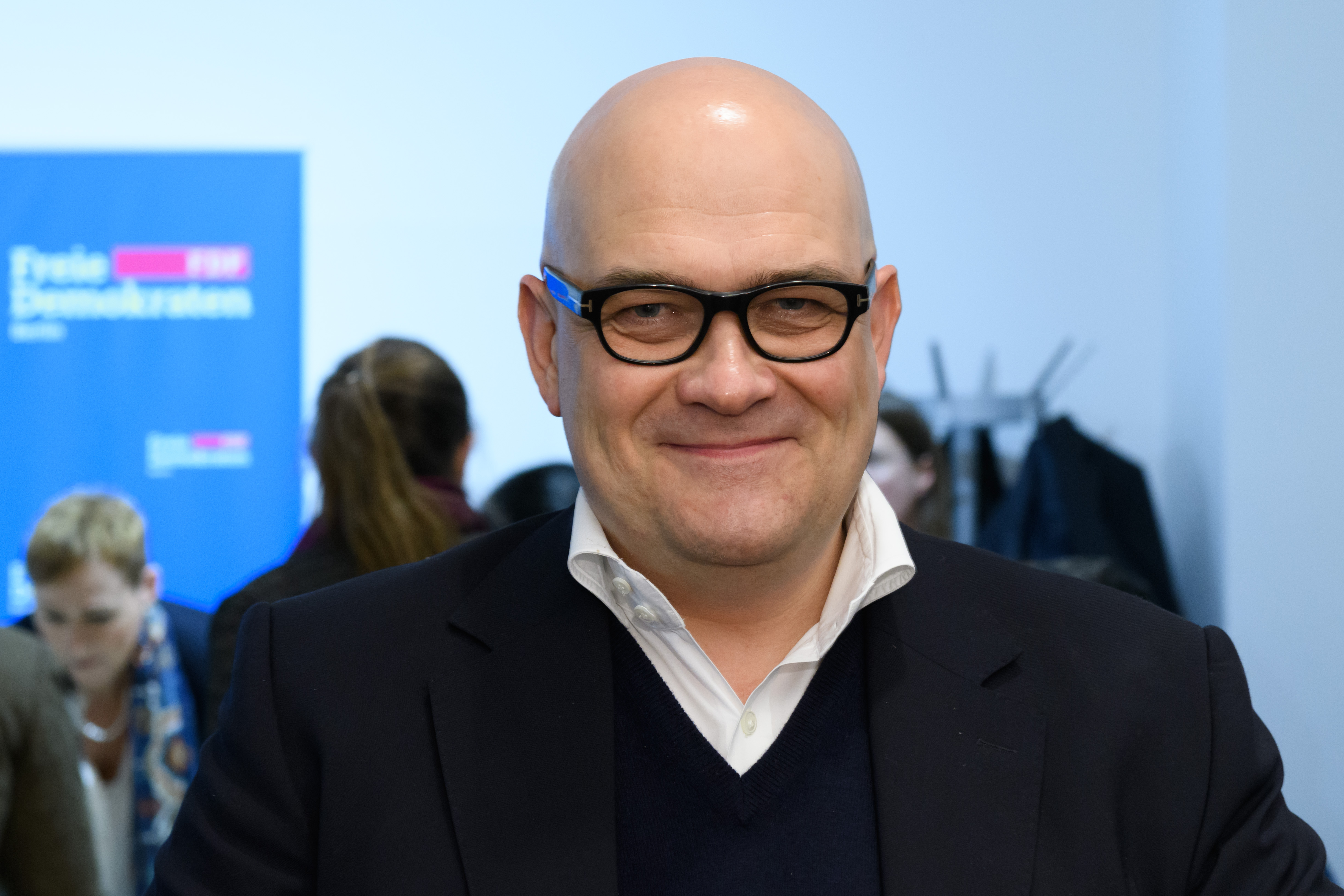 Pressefoto Lars Lindemann (FDP Berlin)